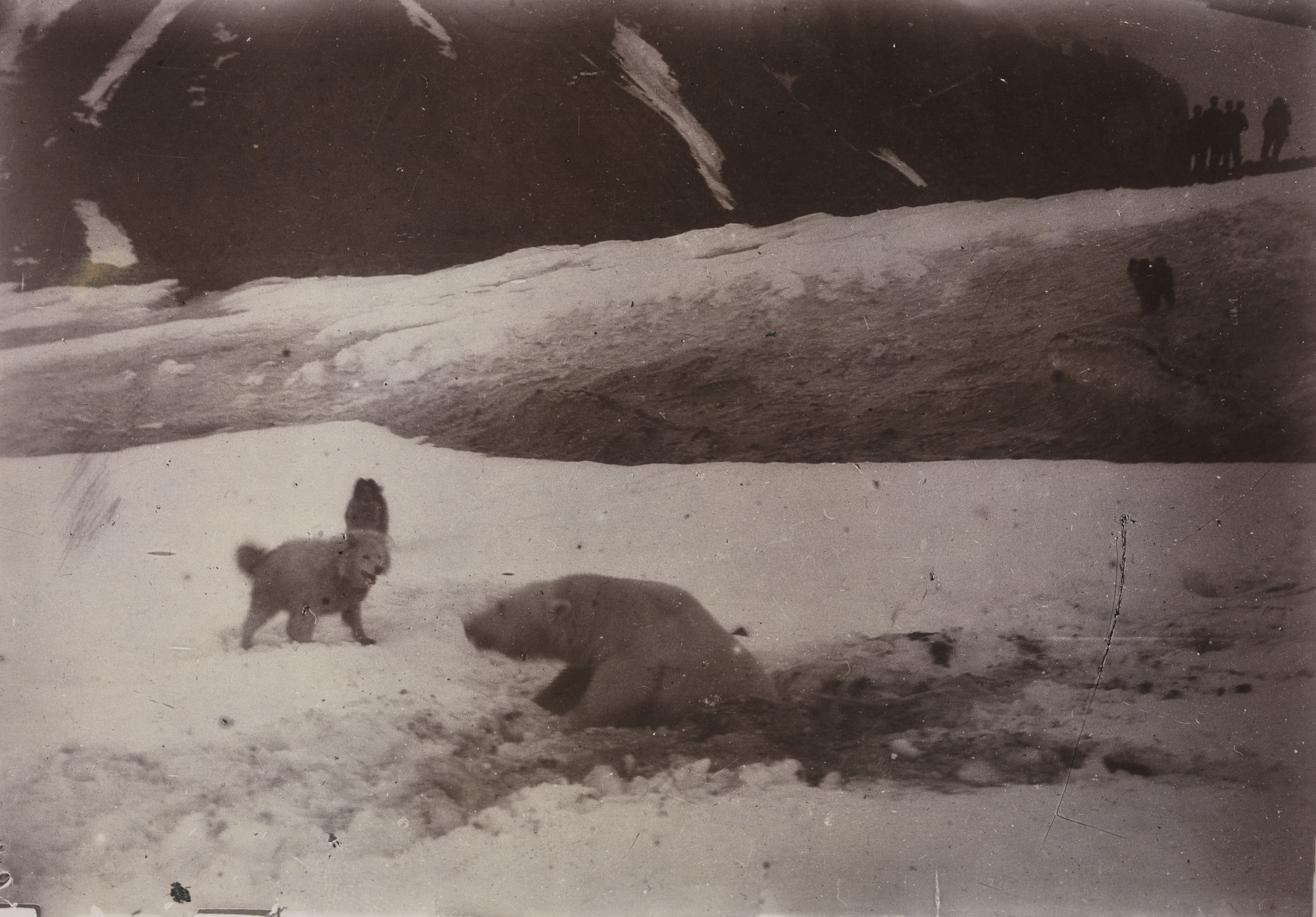 Isbjørnjakt. En såret isbjørn omringet av hundene. Ett av bildene fra ekspedisjonen med polarskip mot Nordpolen i perioden 24 juni 1893 til 13 august 1896. Etter planen skulle skipet drive i isen med havstrømmer fra Sibirkysten over Nordpolen mot Grønland. I mars 1895 foretok Fridtjof Nansen sammen med en ledsager en hasardiøs skiferd med hundesleder i forsøket på å komme til polpunktet. Depicted place: Russland, Frans Josefs Land, Kap Flora